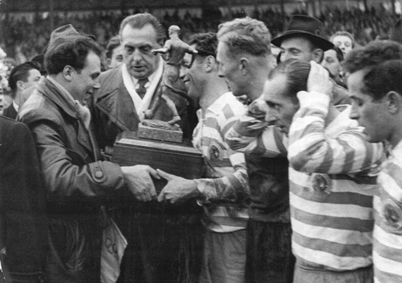 Zentralbild-Funck-Schlegel Fu-Ho. 12.11.1956 Wismut wurde neuer Fußballmeister - Am Sonntag, dem 11.11.1956, standen sich in Aue im entscheidenden Kampf um die Meisterschaft Wismut Karl-Marx-Stadt und Lok Leipzig gegenüber. Durch einen 1:0-Sieg wurde Wismut neuer Titelträger unserer Republik. UBz: Der Vorsitzende des Referates Fußball beim Staatlichen Komitee für Körperkultur und Sport, Kurt Langer (links), überreicht dem Spielführer des SC Wismut, Erhard Nauer, dem vom Präsidenten der DDR, Wilhelm Pieck, gestifteten Wanderpokal. Der Pokal wurde in diesem Jahr erstmalig vergeben. Wir erkennen von links: Kurt Langer, Hans Weimar (Sektion Fußball), Erhard Bauer, Kurt Steinbach, Karl Wolf und Günther Viertel.